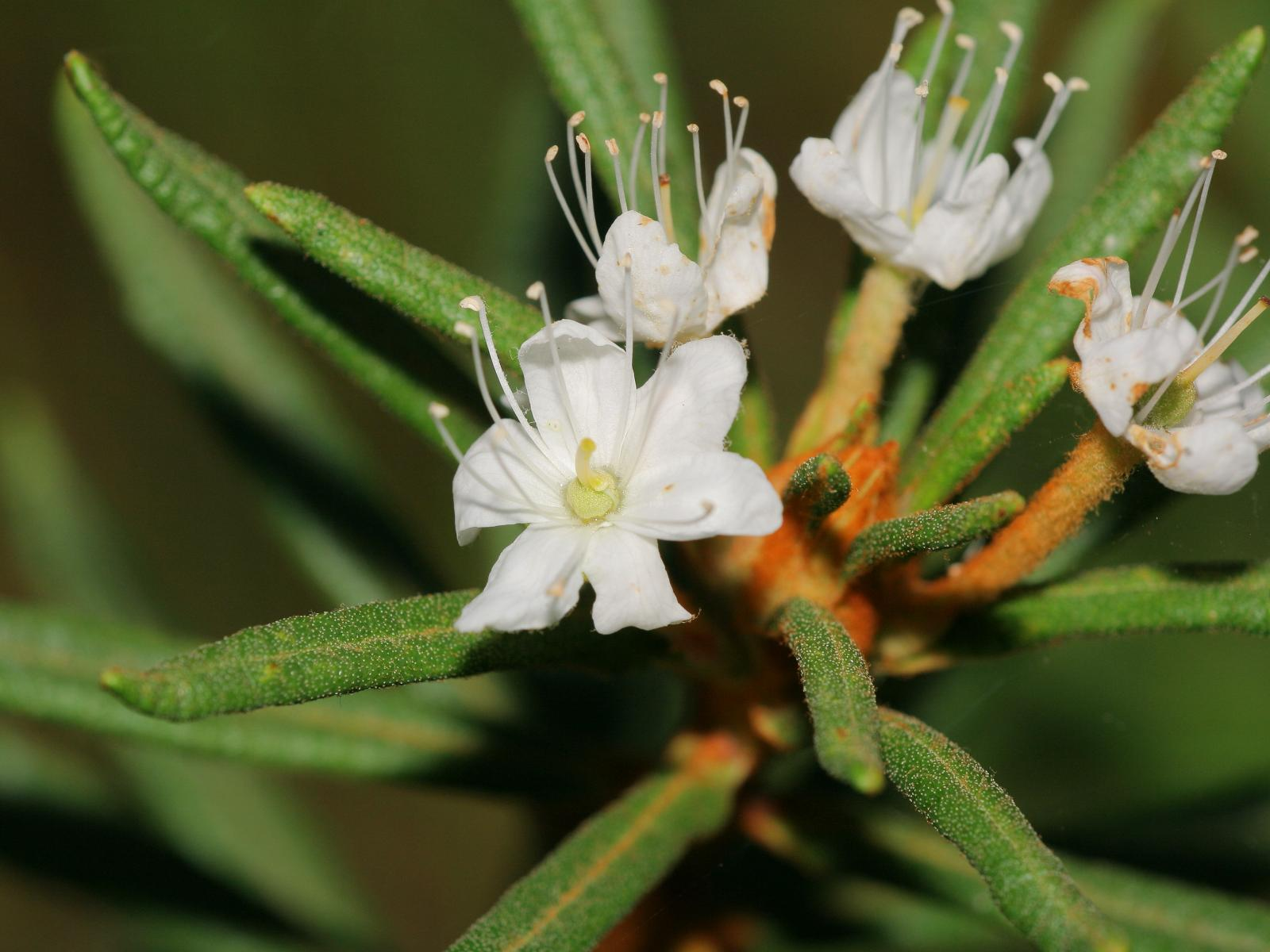 Sumpf-Porst (Ledum palustre)